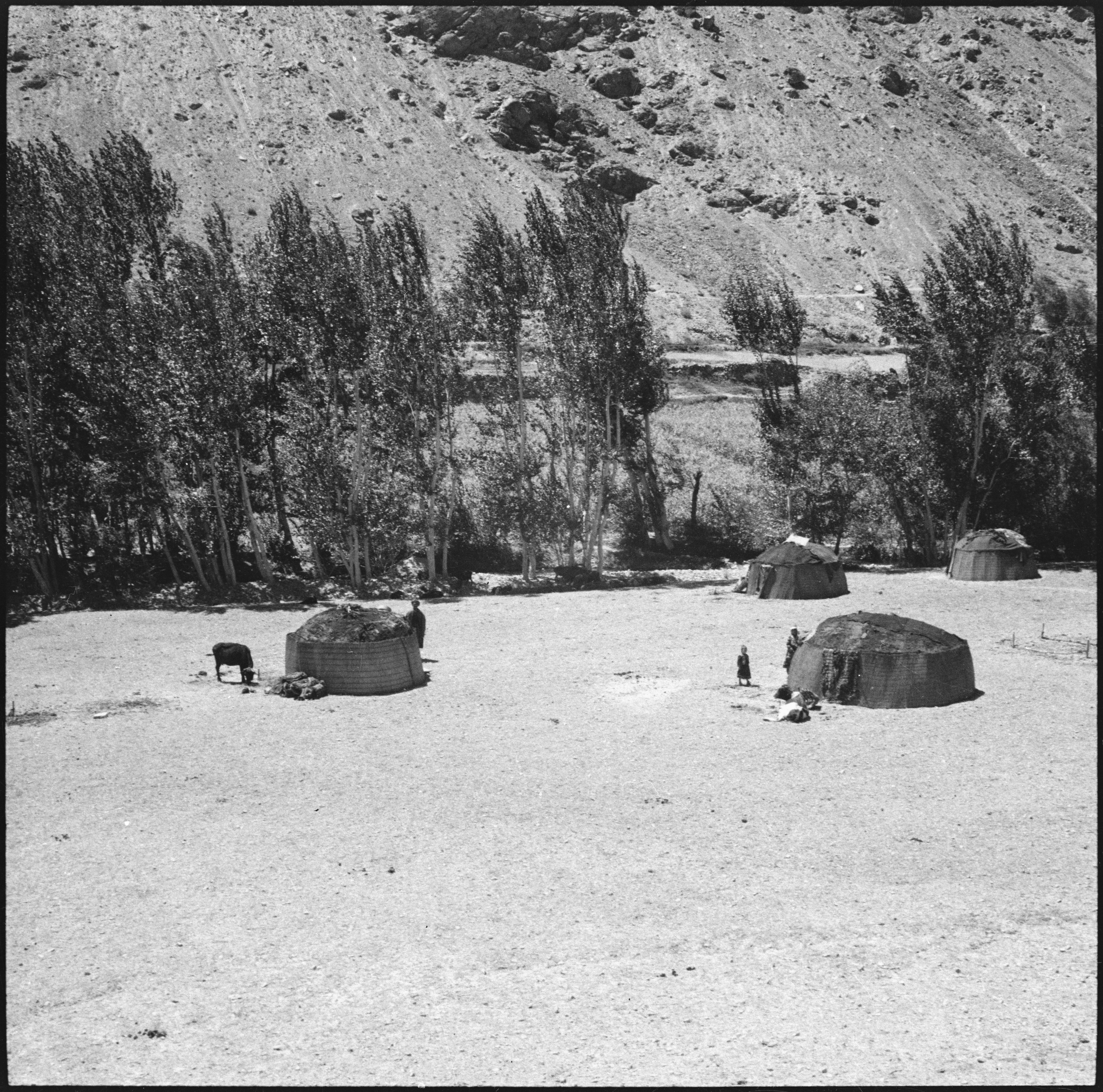 Afghanistan, Shibar Pass (Shebar Pass, Kowtal-e Shebar): Landschaft; Jurten in einem Tal